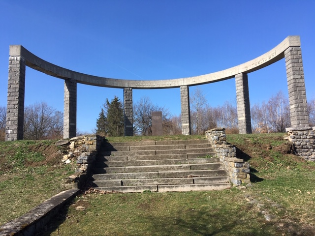 Památník obětem 2. sv. války, Švehlův pomník